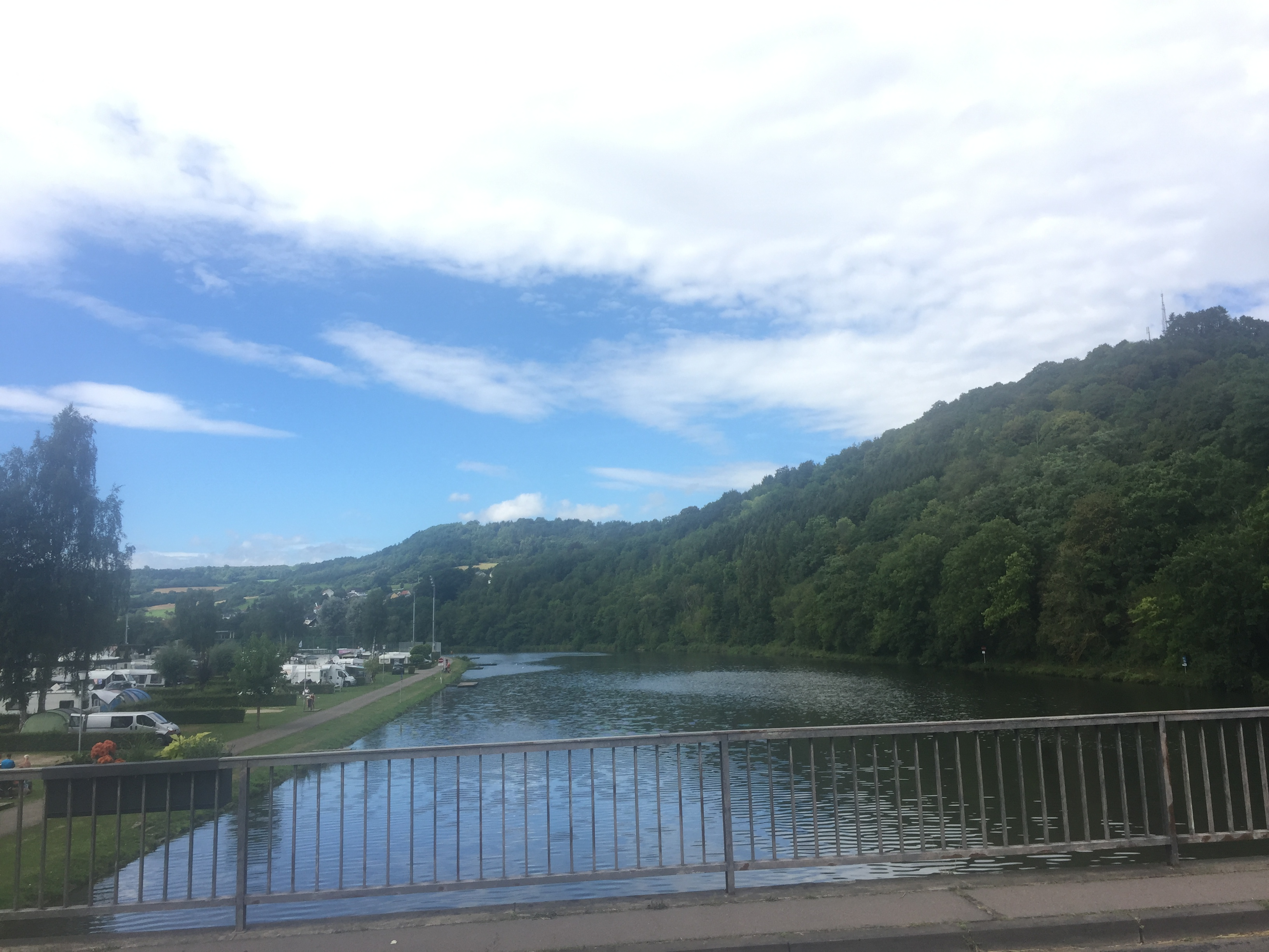 Río Sûre junto a Ralingen